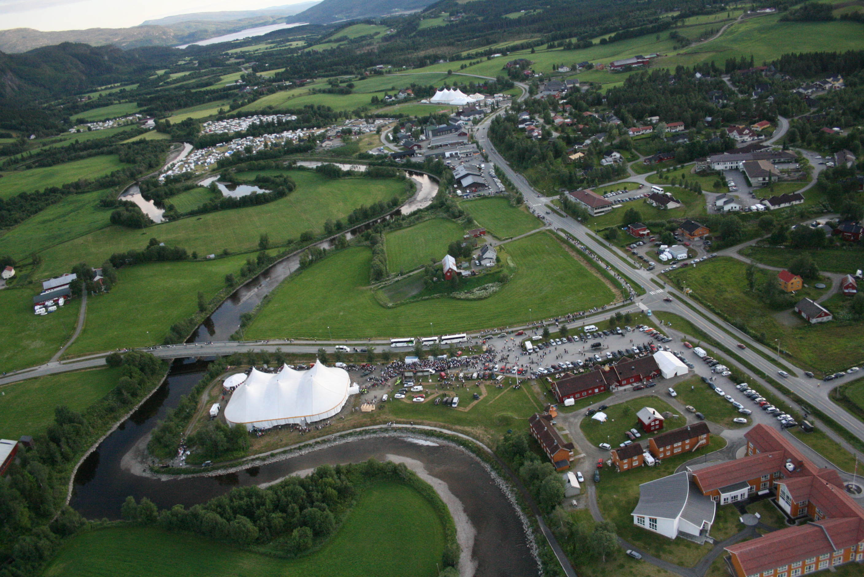 Høylandet frå lufta under Norsk revyfestival 2007